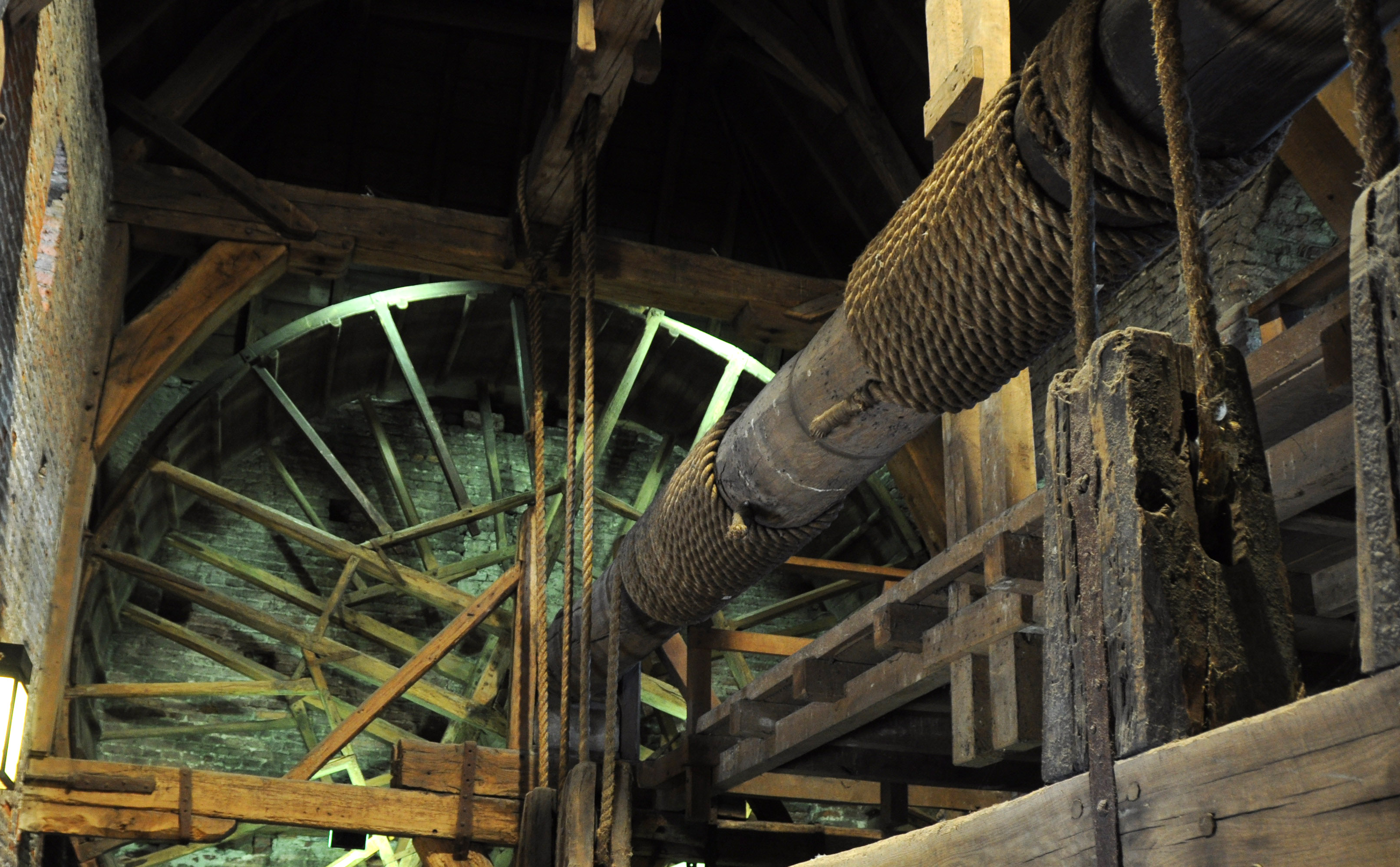 Het rad binnen in de koppelpoort in amersfoort